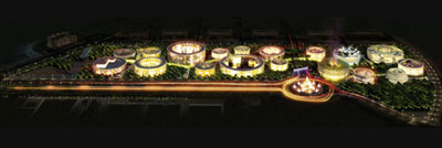 Imagen nocturna del Campus de la Justicia